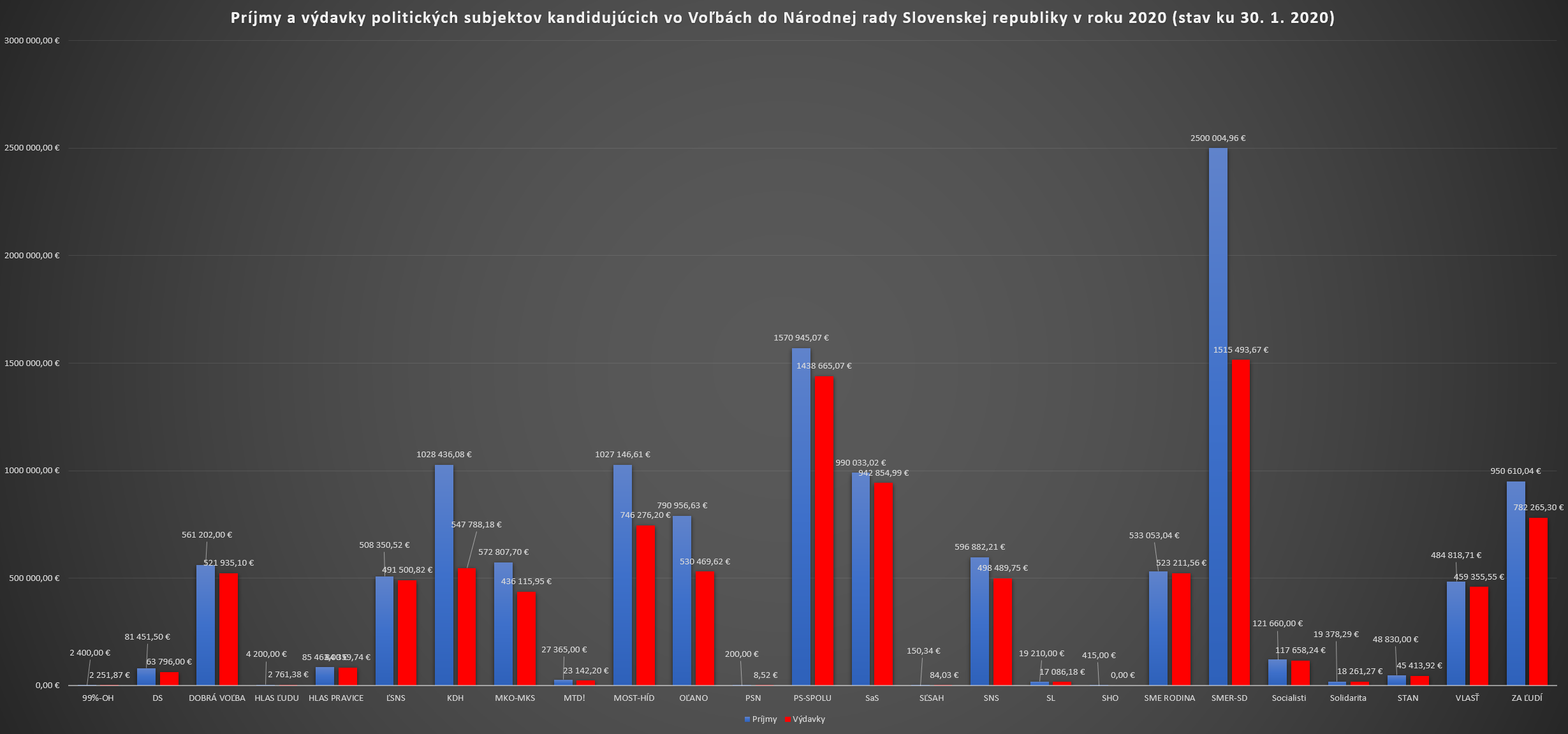 Aktuálne ku 30.1.2020; dáta získané z transparentných účtov politických strán a hnutí.